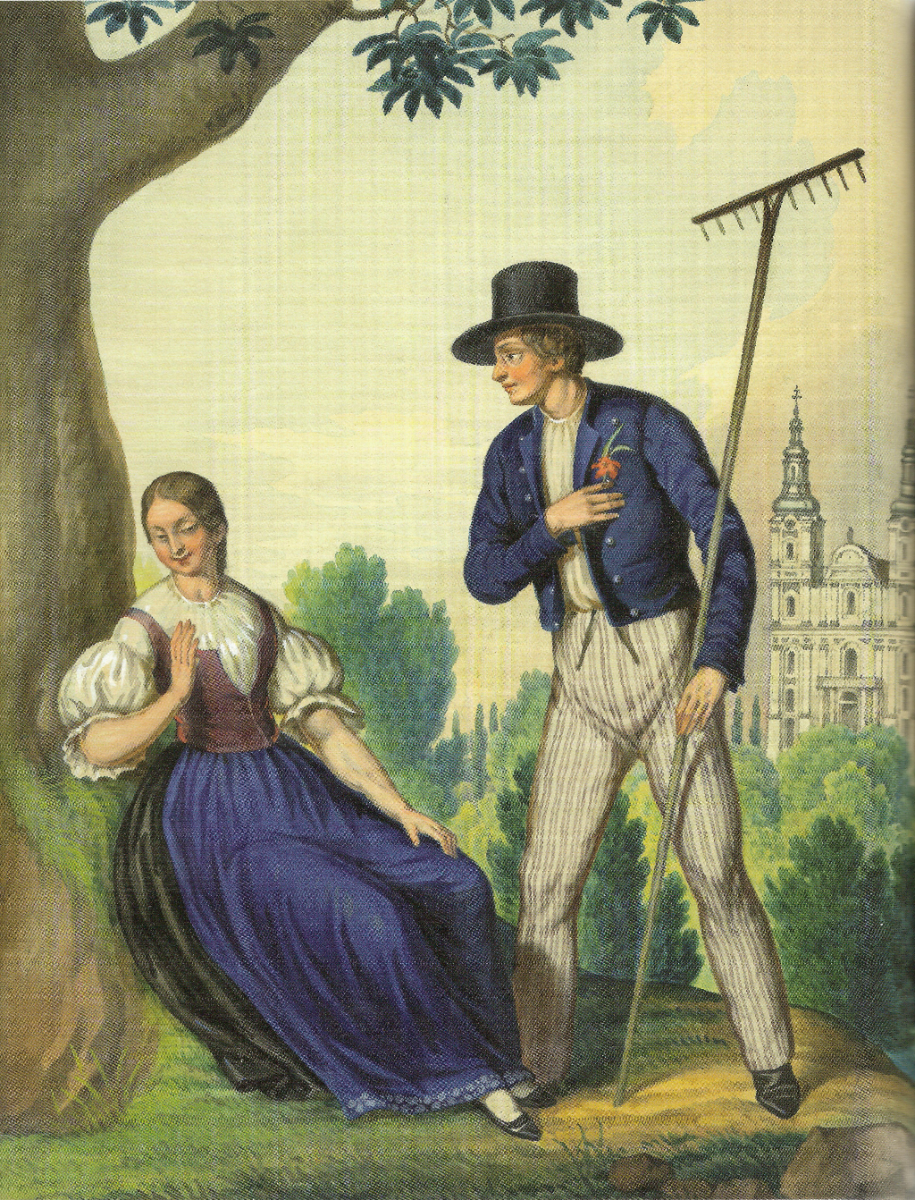 Akwarela Henryka Jastrzembskiego przedstawiająca Włościan z okolic Frydka z 1846 roku.